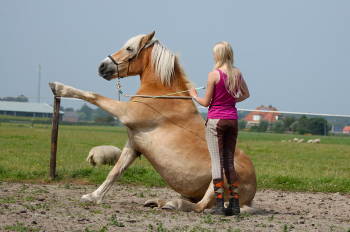 Zittend en de jambette (voetje) - Haflinger Sita